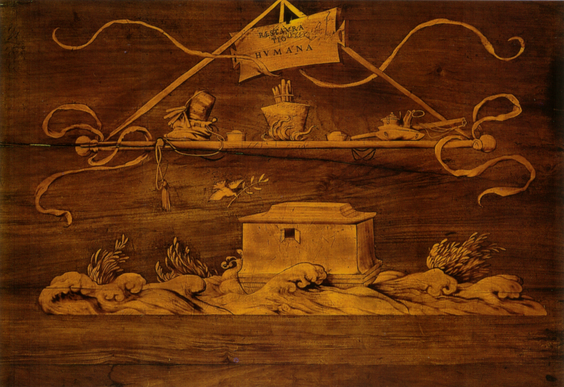 7.02 rastauratio humana